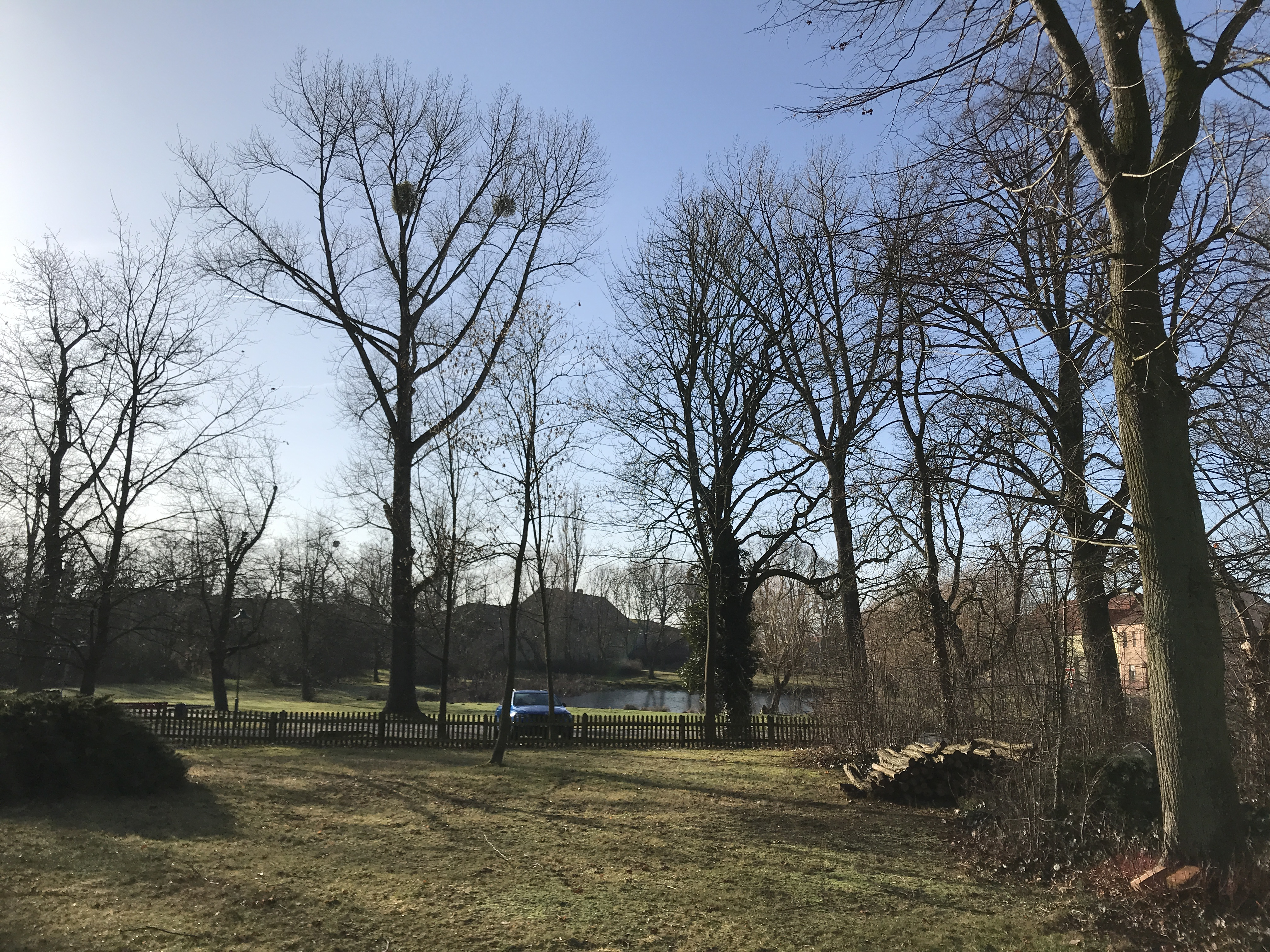 Heinsdorf war bis 1957 eine eigenständige Gemeinde und ist seit 2003 gemeinsam mit der ebenfalls ehemaligen Gemeinde Niebendorf nach dem Zusammenschluss als Niebendorf-Heinsdorf ein Ortsteil der Stadt Dahme/Mark im Landkreis Teltow-Fläming in Brandenburg.